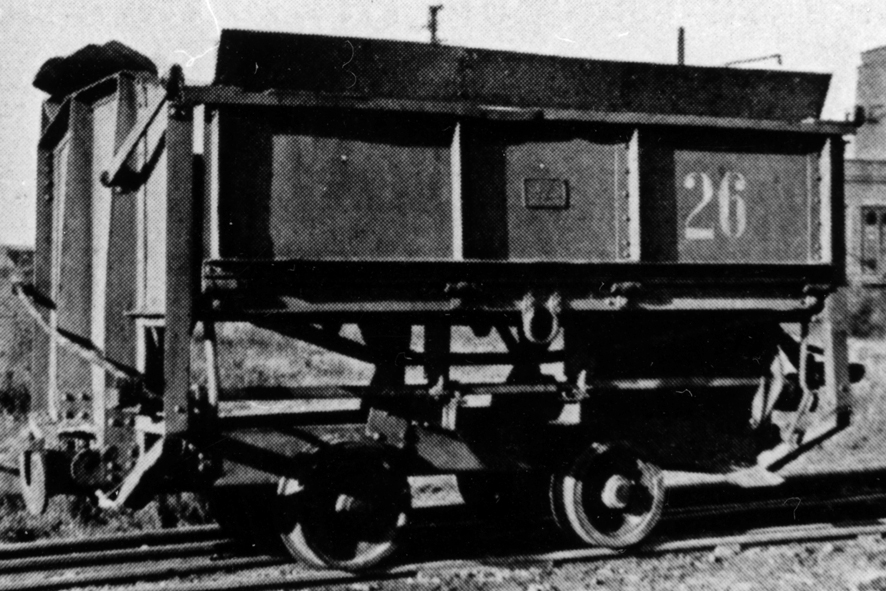 Wagen der Abraumbahn der Grube Messel